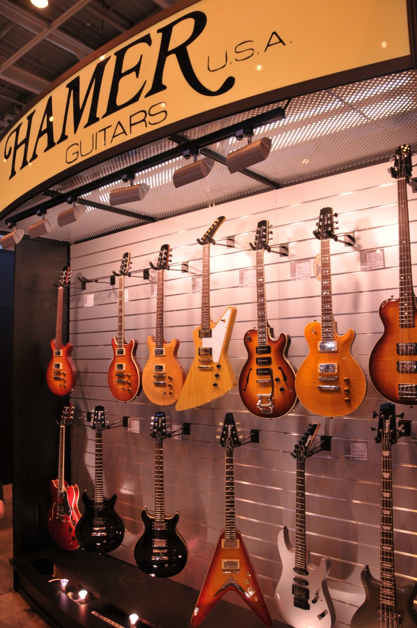 Hamer Guitars Salon de la Musique et du Son 2008